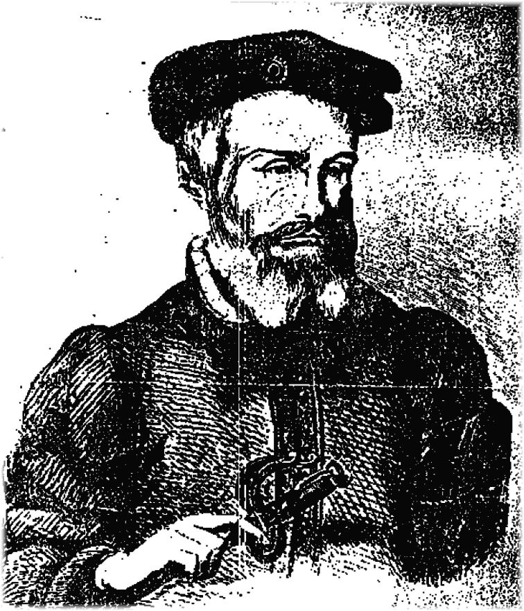 Retrato de Guillén de Castro (Valencia, 1569 - Madrid, 1631) por Juan Ribalta, grabado a la edición de Don Quijote de la Mancha, obra teatral de Guillén de Castro, Valencia, Establiment Tipográfich Doménech, 1905